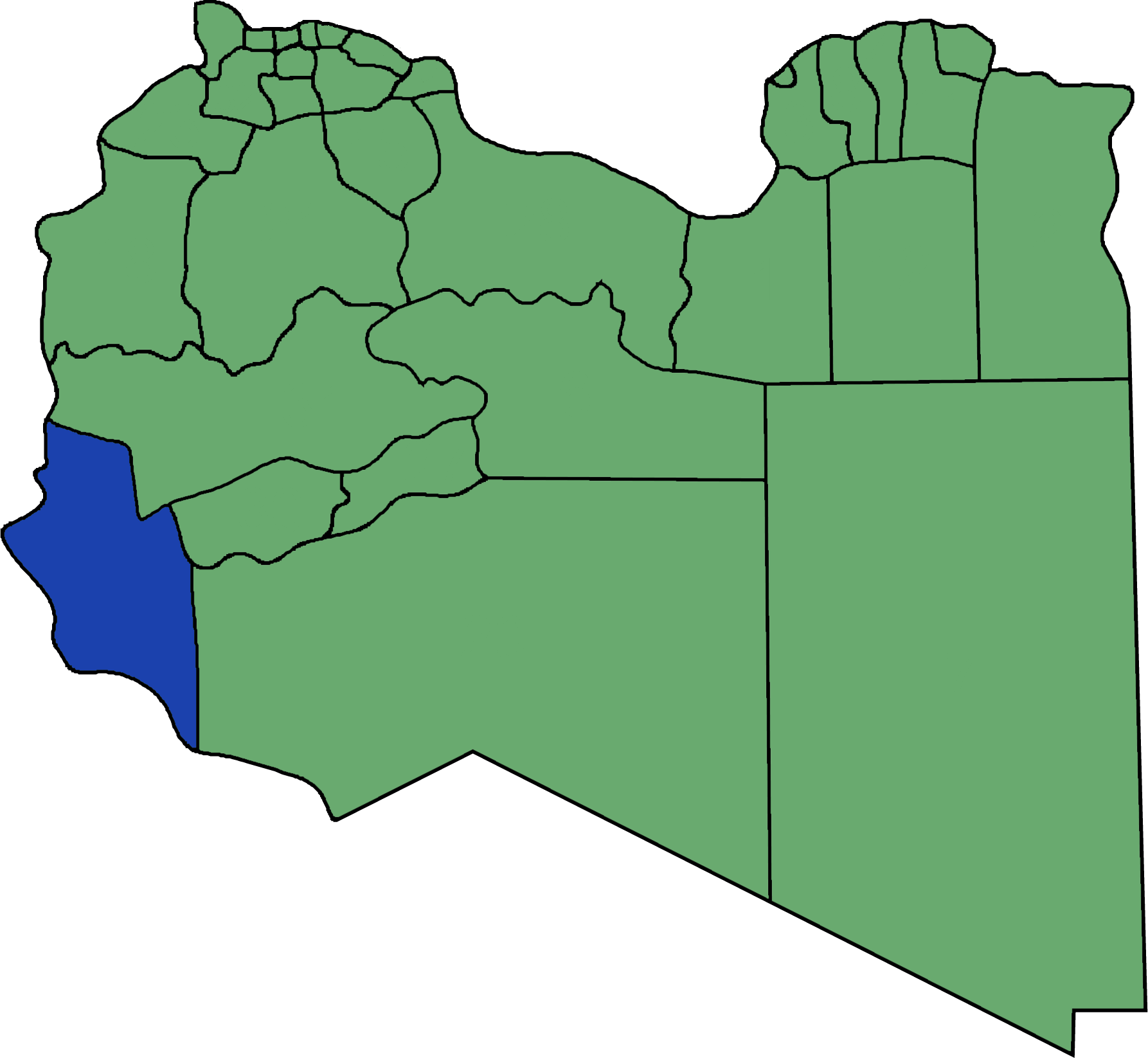 Die neuen Gemeinden (Munizipien) in Libyen. Ghat hervorgehoben.